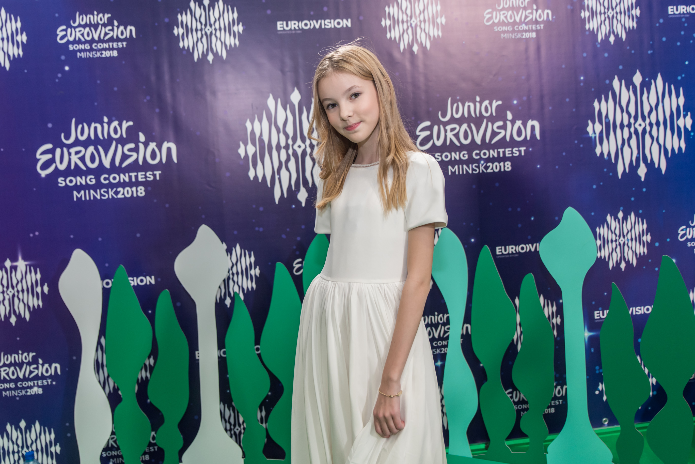 Детское Евровидение 2018. (Казахстан) Данелия Тулешова